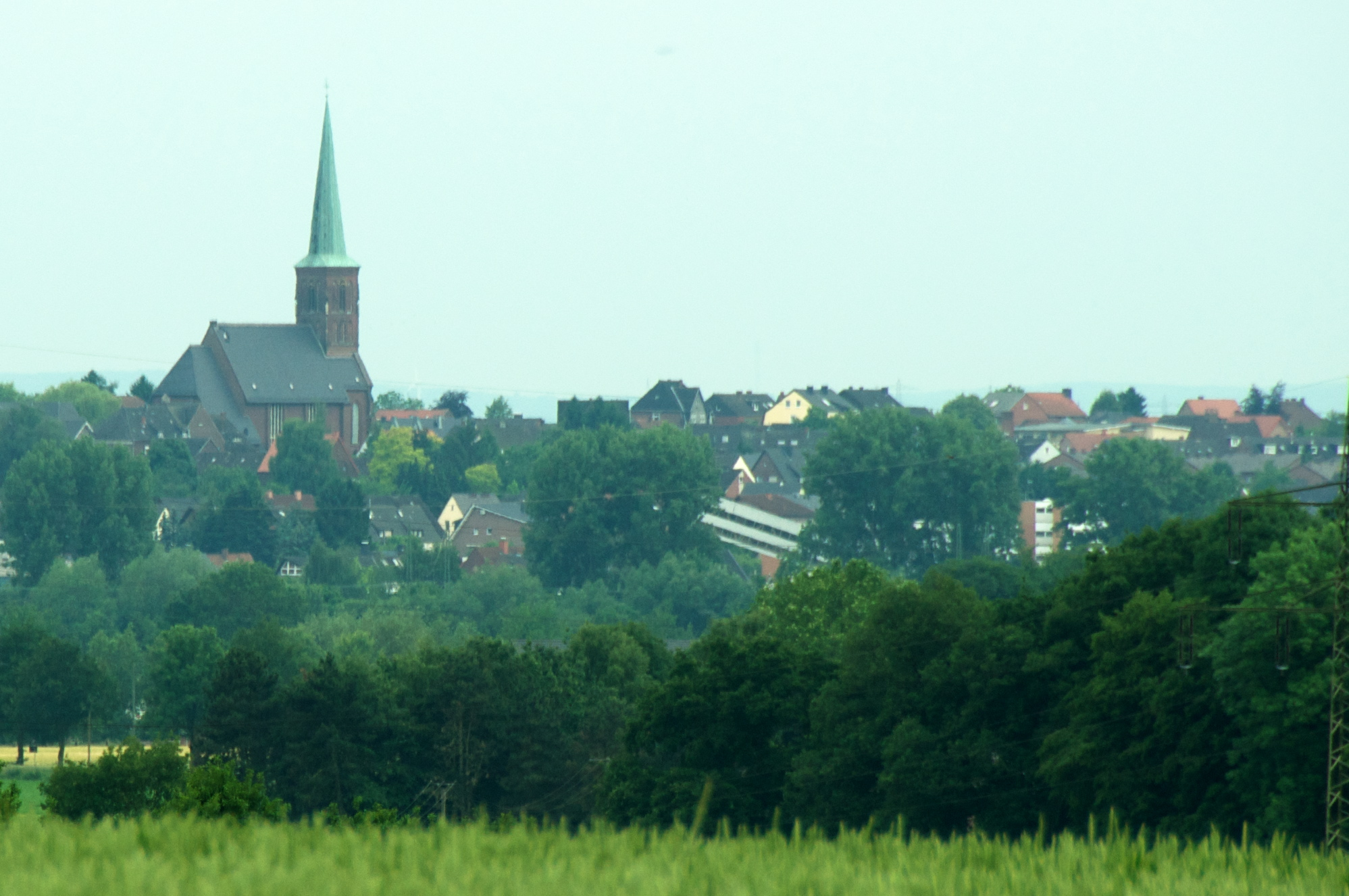 Blick von Nordosten auf Hövel, St. Pankratius